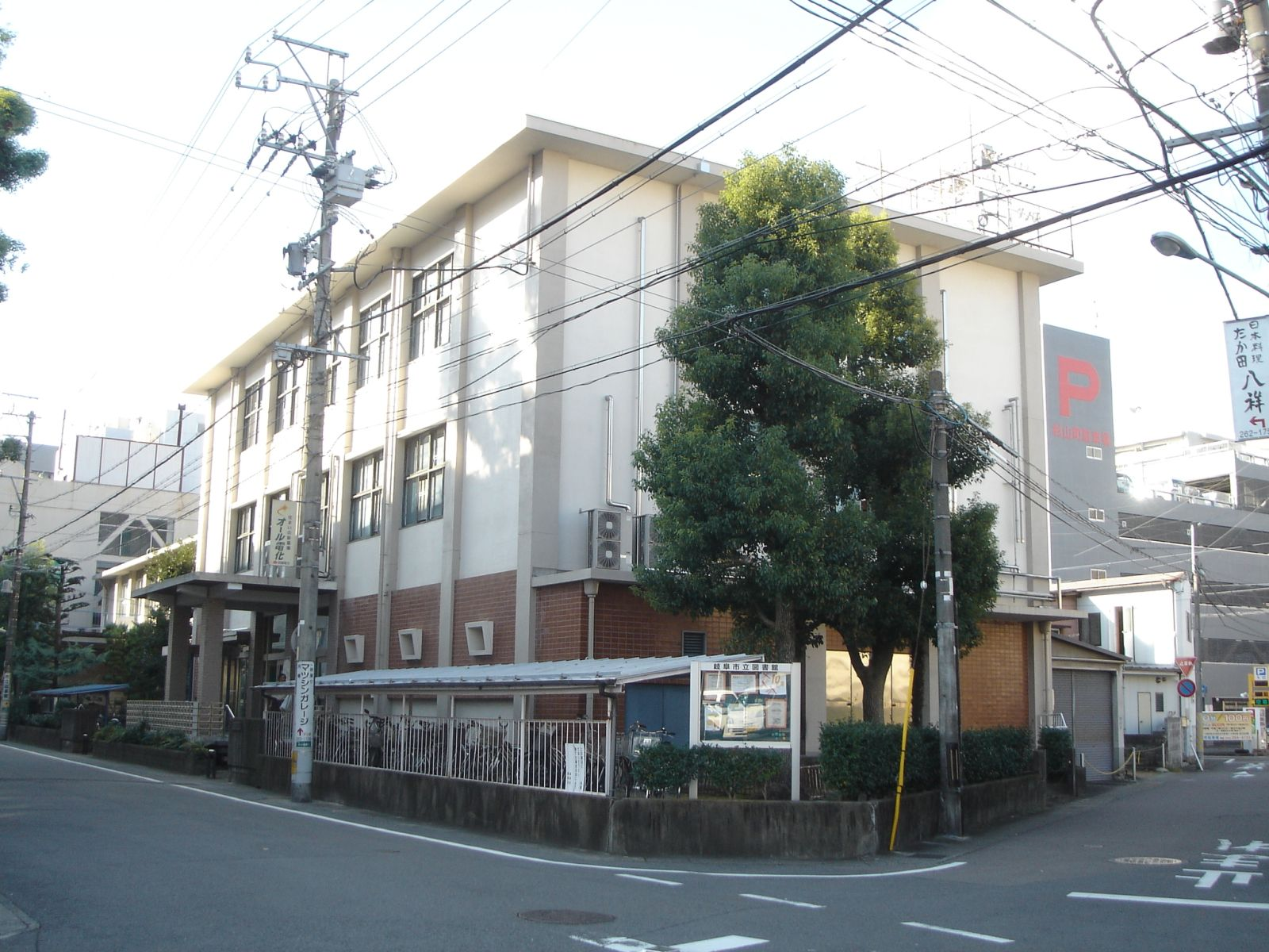 岐阜市立図書館本館。2015年閉館。岐阜県岐阜市八ツ寺町。